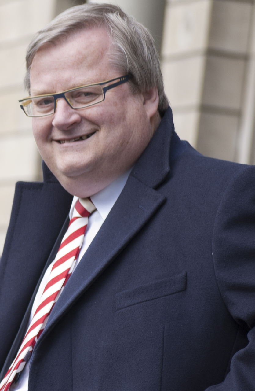 Voormalig LPF-minister Hilbrand Nawijn in Rotterdam. Nawijn was in het kabinet Balkenende I minister voor Vreemdelingenzaken en Integratie.